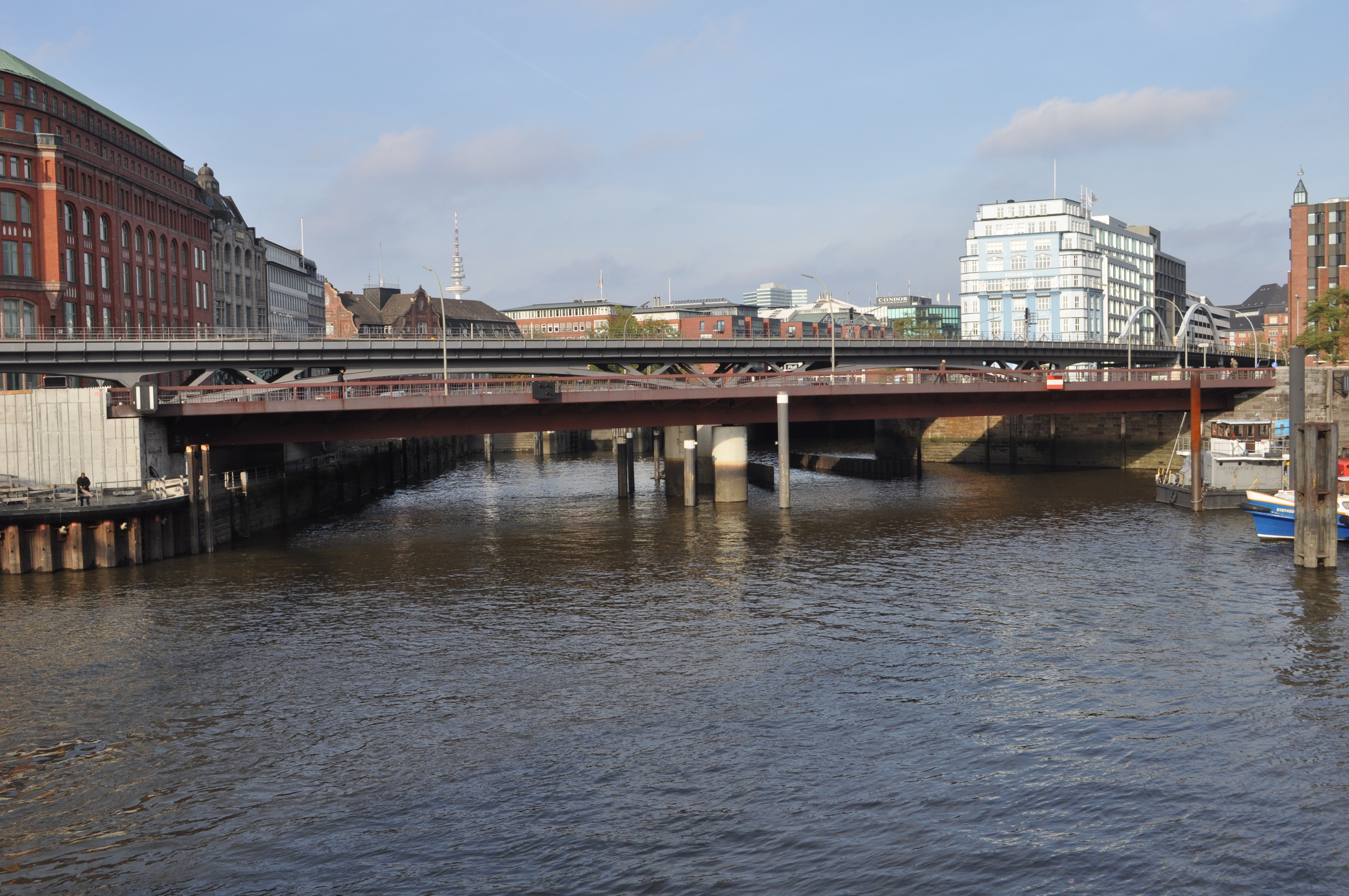 Die Otto-Sill-Brücke über die Mündung des Alsterfleets in den Binnenhafen in Hamburg.